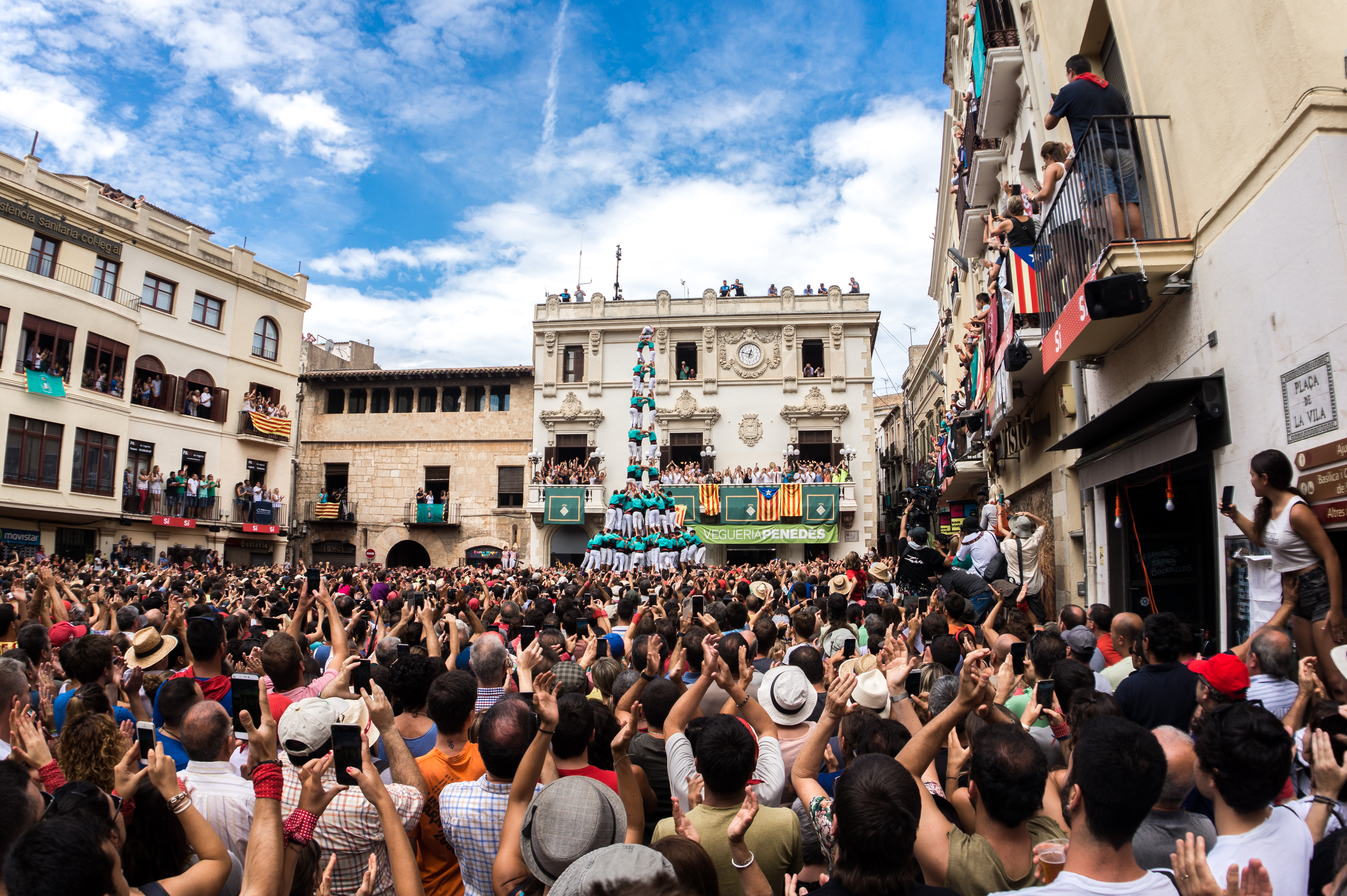 Fiesta Mayor de Villafranca de Panadés 2017. Jornada castellera en la Plaza de la Vila.